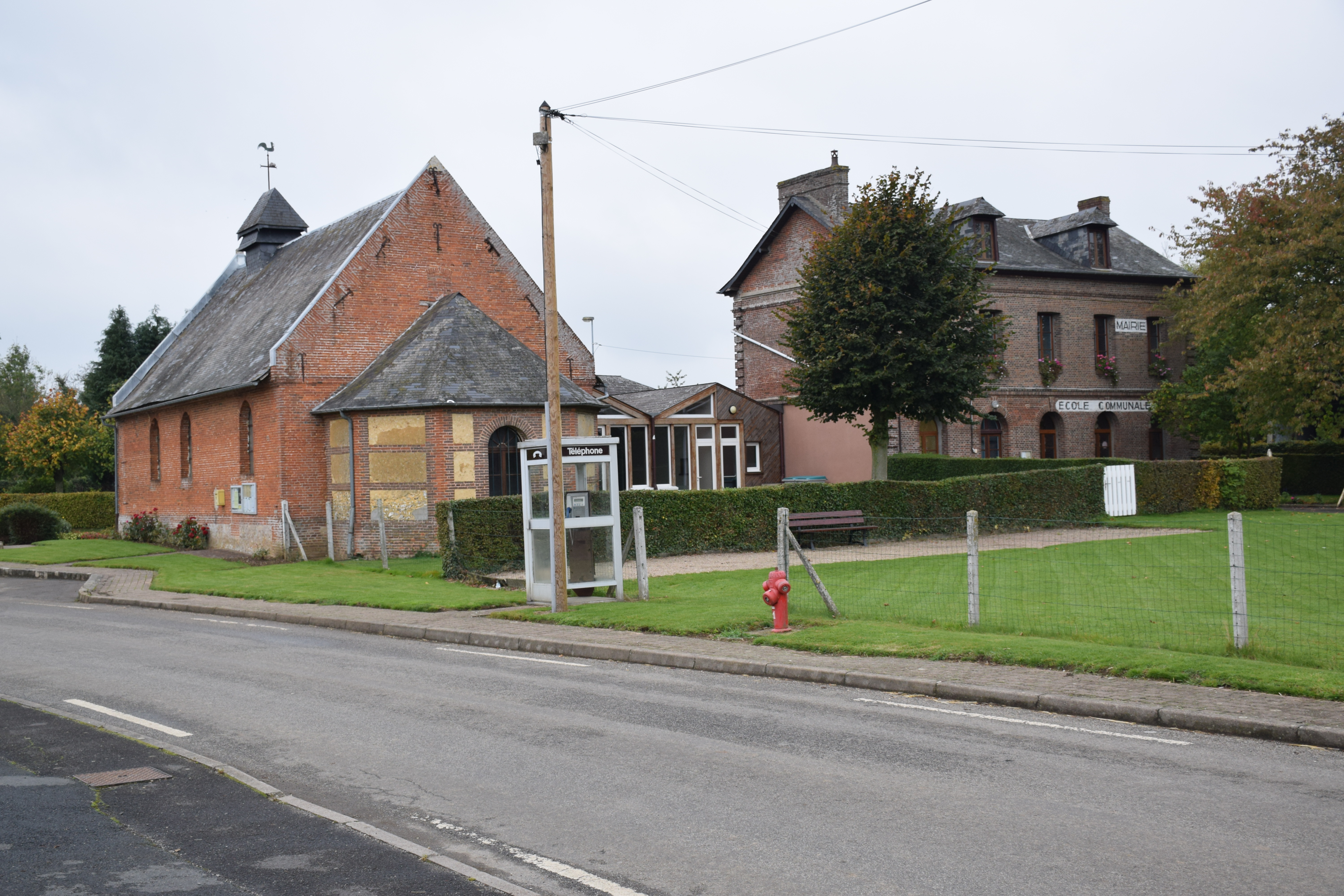 Mairie, Eglise